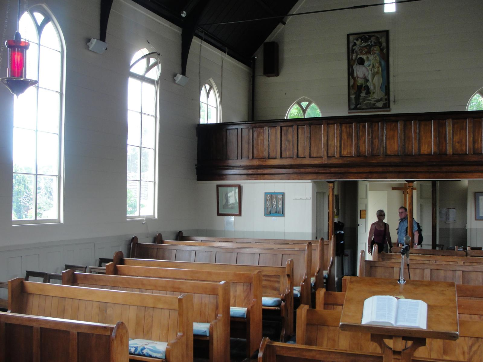 Christ Church, Russell